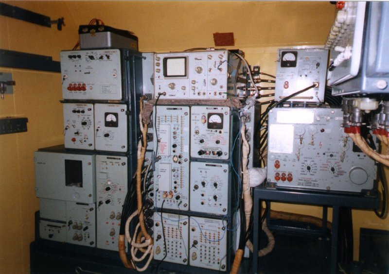 Parol Elektronik Racks